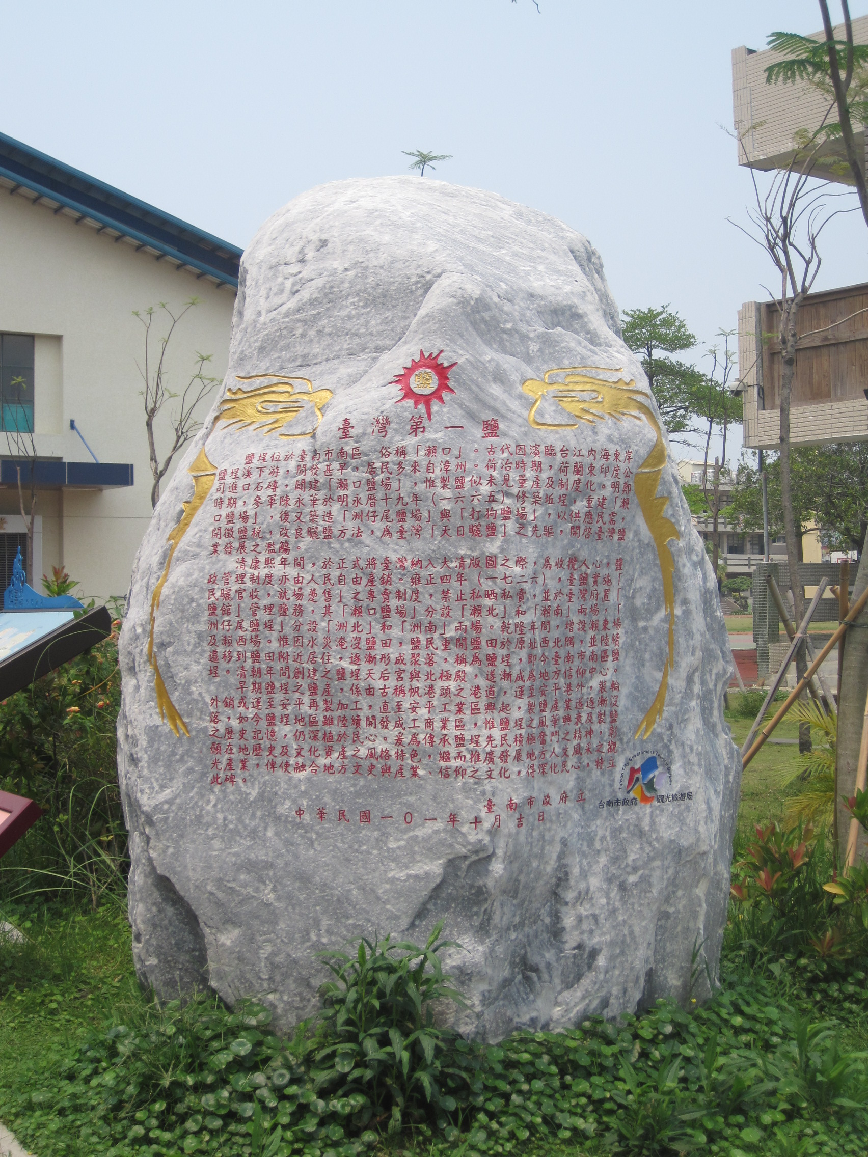 臺灣第一鹽碑，2012年10月臺南市政府立，紀念瀨口鹽場為臺灣最早鹽場。